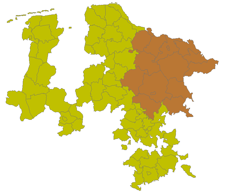 Kreise im Regierungsbezirk Lüneburg der Provinz Hannover 1905